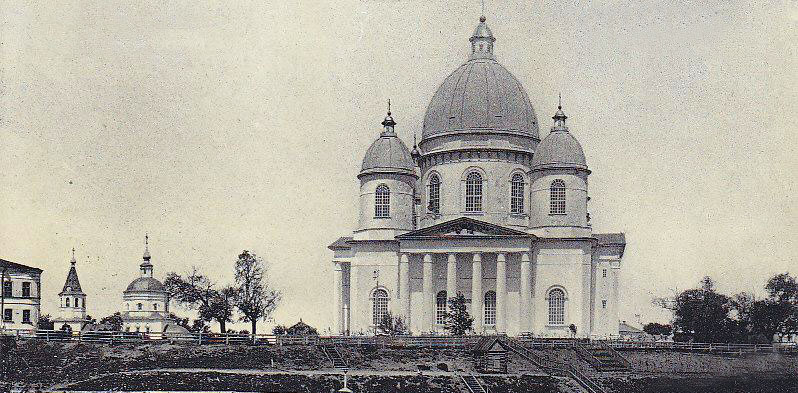 Троицкий собор в Моршанске до революции.